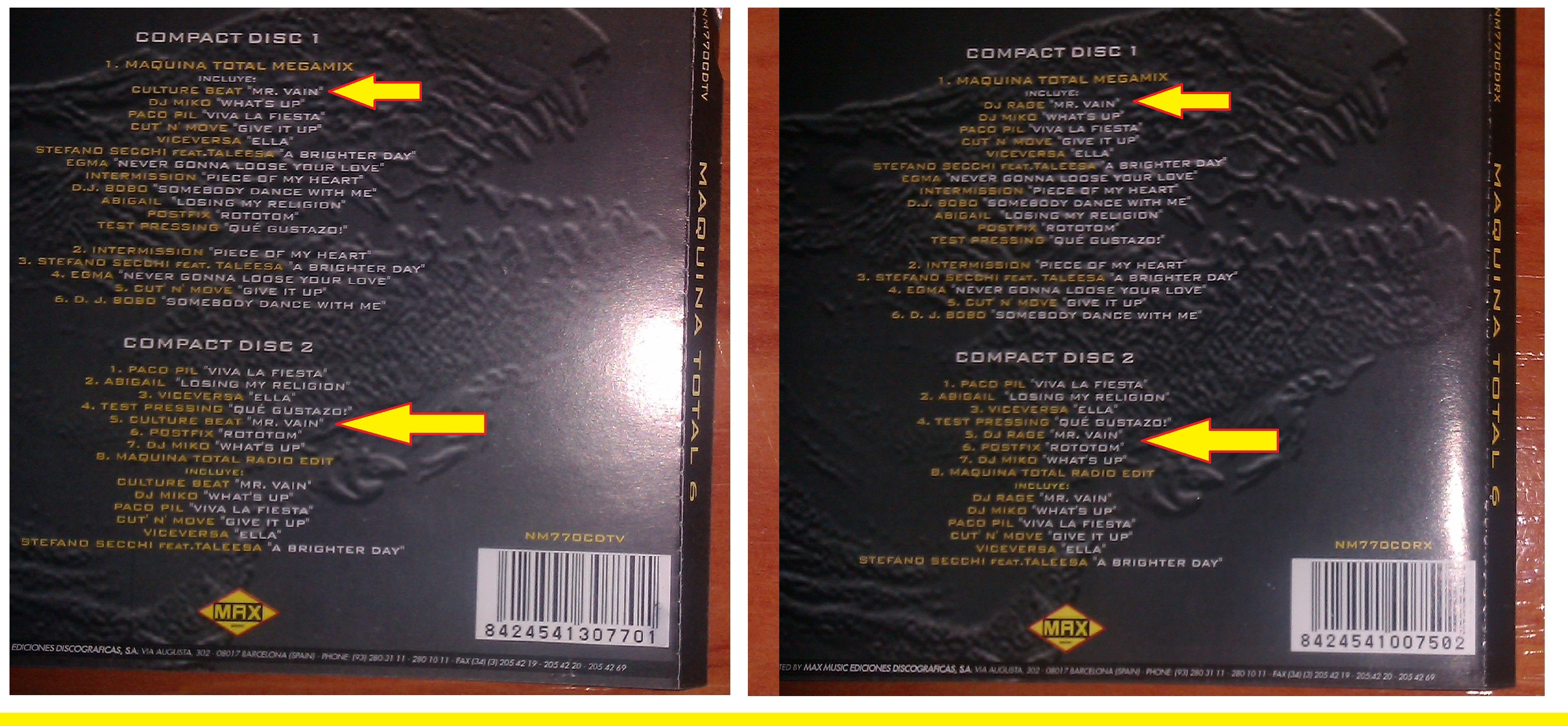 Apreciación de las dos versiones del "Mr.Vain" en dos MT 6, uno con el original Culture Beat y otro con el cóver de Dj Rage.